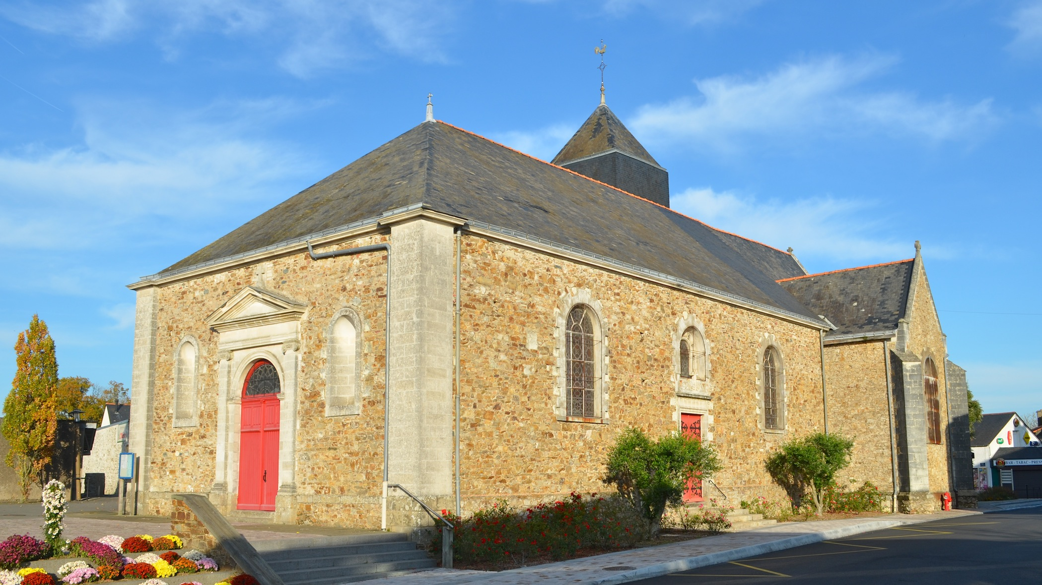 Eglise paroissiale - Saint-Jean-de-Boiseau (Loire-Atlantique)